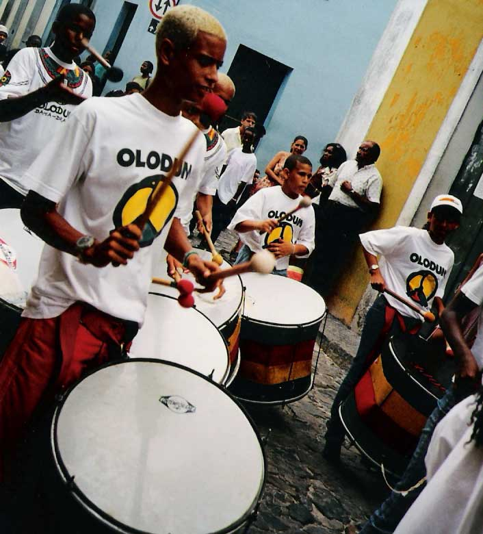 Imagen da wikipedia americana Licensing Image:Olodum-drummers.jpg